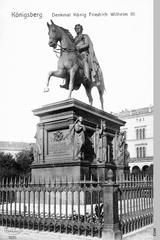 Denkmal Friedrich Wilhlems auf dem Paradeplatz